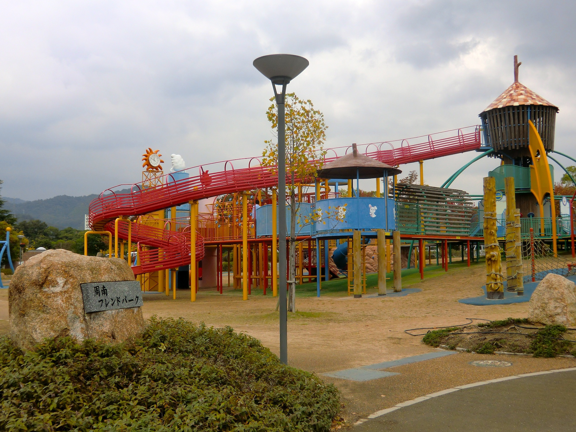 周南緑地公園の周南フレンドパーク（山口県周南市）